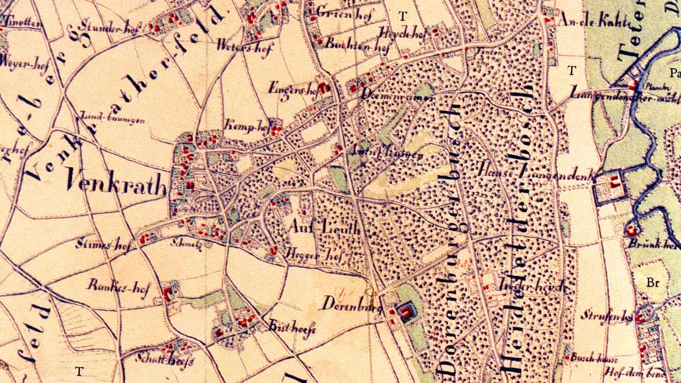 Kartenaufnahme der Rheinlande durch Tranchot und von Müffling, Blatt 34 (Grefrath), Ausschnitt mit dem Gebiet des Dorfs Vinkrath.